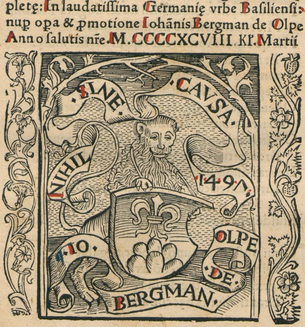 Druckerzeichen von Johann Bergmann von Olpe 1497, in einem Druck von 1498